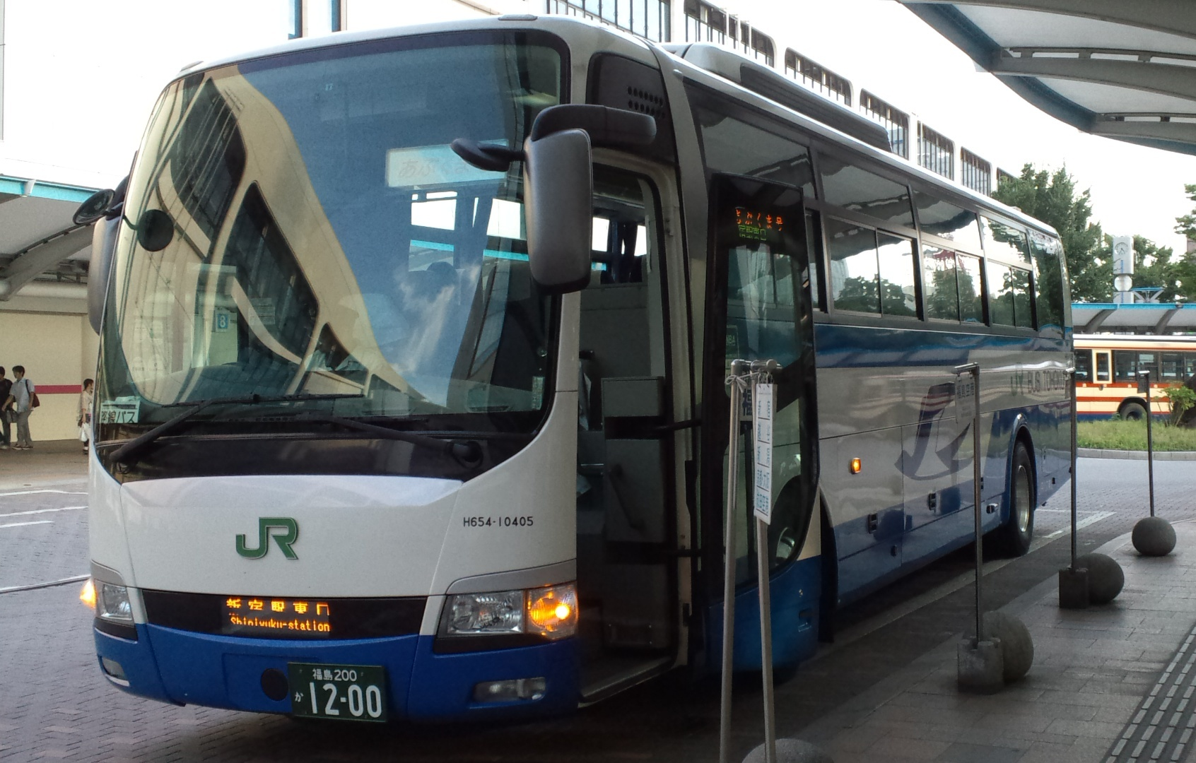 ジェイアールバス東北（JR Bus Tohoku） 福島支店所属 Car No.車番H654-10405 高速用車両 三菱ふそう・エアロエース BKG-MS96JP 郡山駅前（Koriyama Station）にて撮影